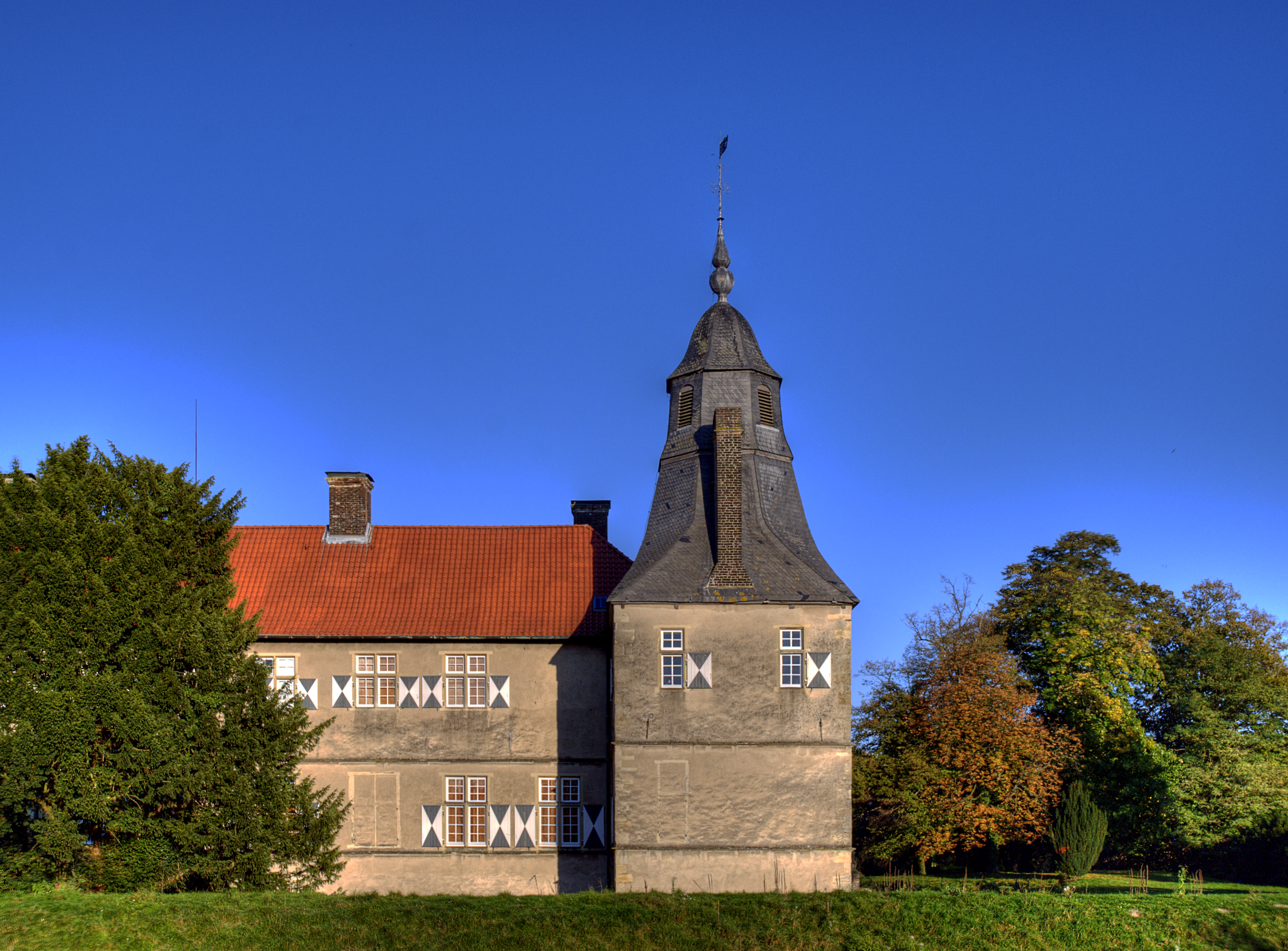 Schloss Westerwinkel im Ascheberger Ortsteil Herbern im Münsterland.